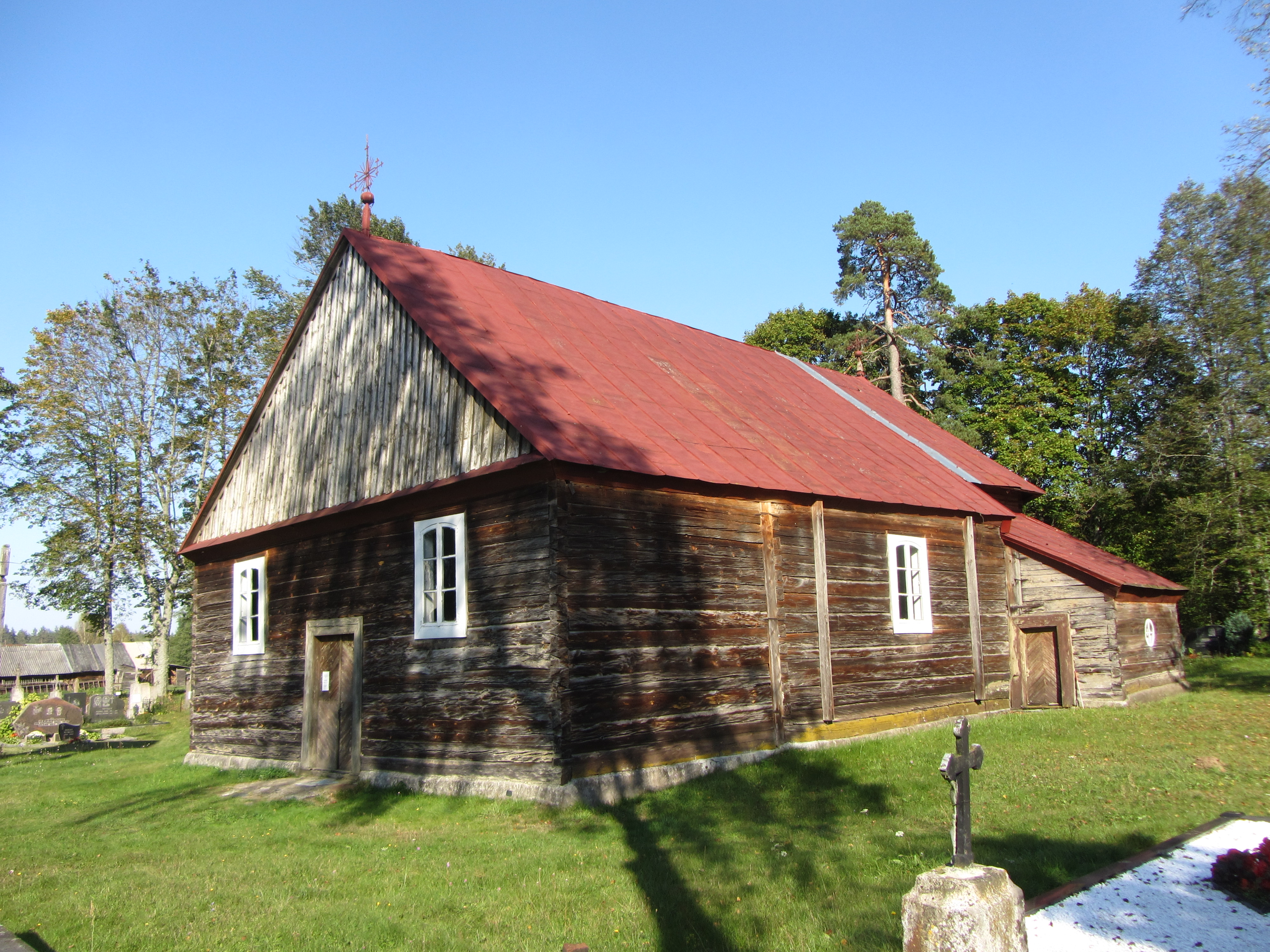 Jakėnų sen., Lithuania